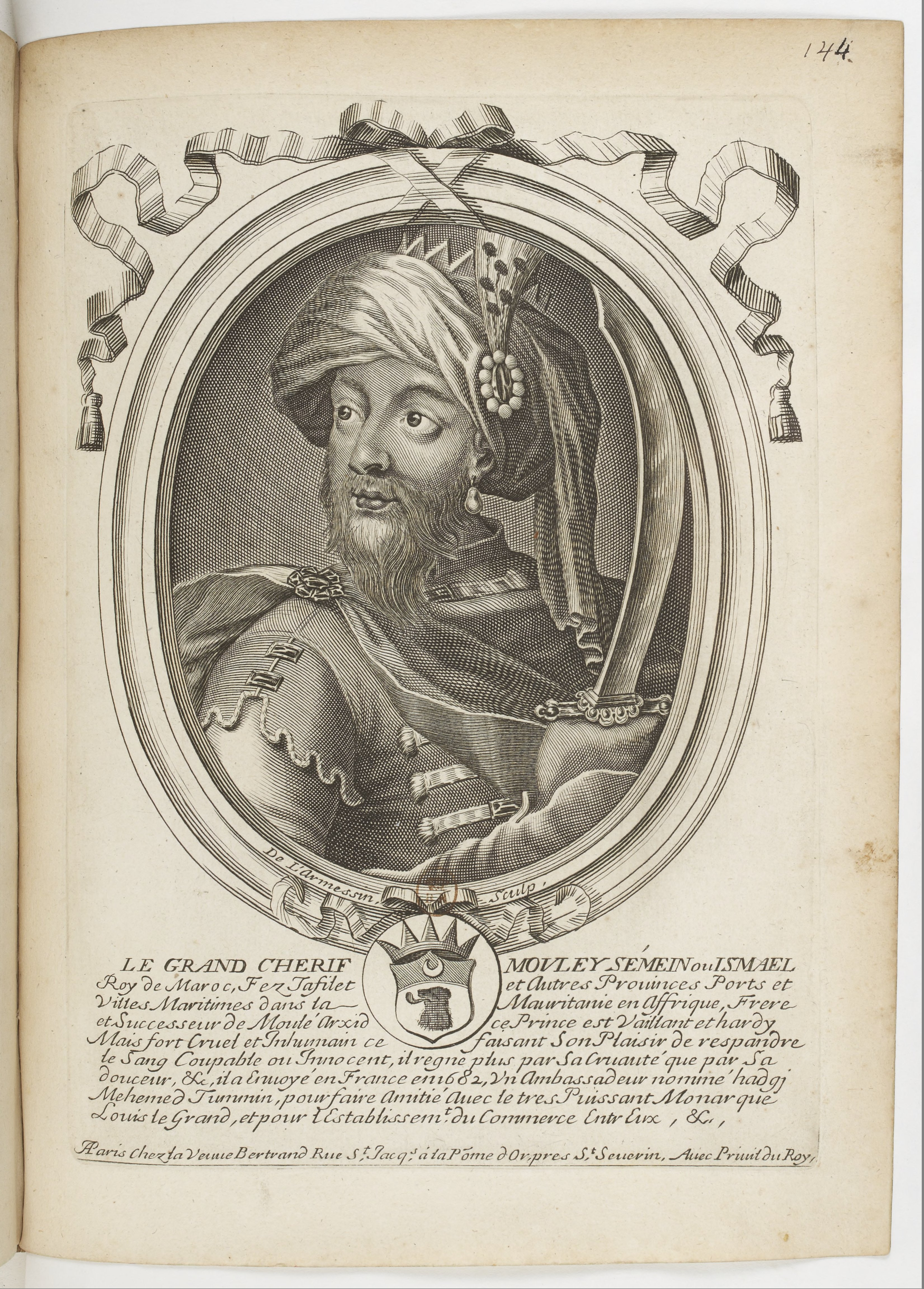 Les augustes représentations de tous les rois de France, depuis Pharamond jusqu'à Louis XIV,... avec un abrégé historique sous chacun, contenant leurs naissances, inclinations et actions plus remarquables pendant leurs règnes